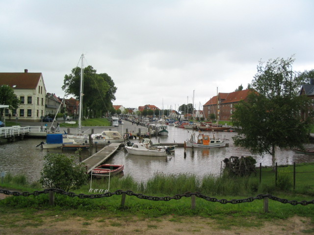 Tönning harbour